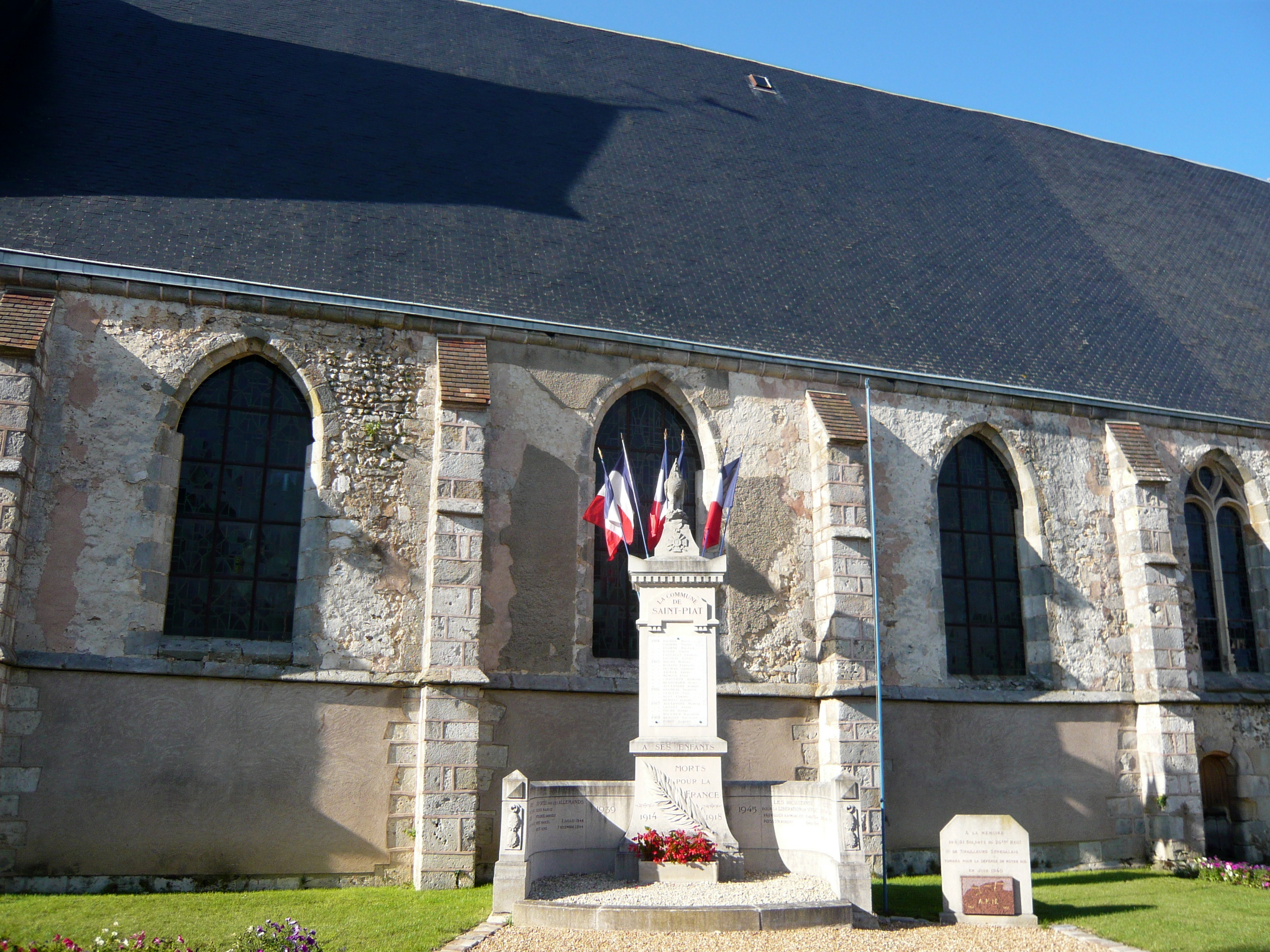 Église et monument aux morts de Saint-Piat, Eure-et-Loir (France).